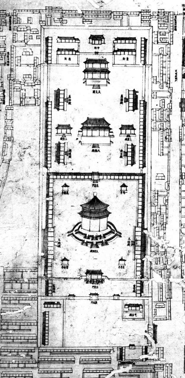 乾隆十五年（1750年）完成的《乾隆京城全图》中的大光明殿。本图来自清內務府藏京城全圖，故宮博物院影印，民國二十九年十二月（1940年）。